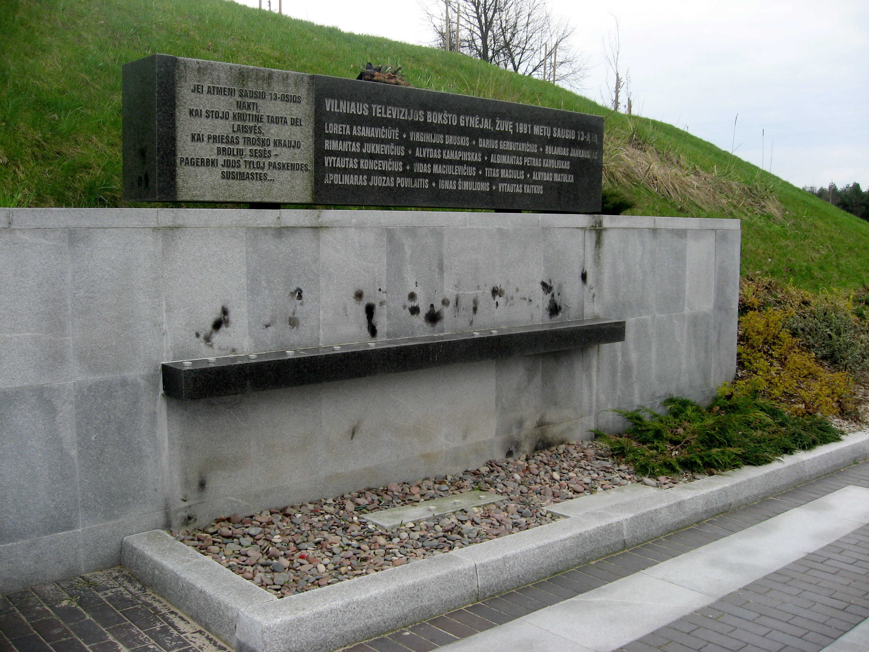 Památník obětí Masakru u Vilniuské televizní věže